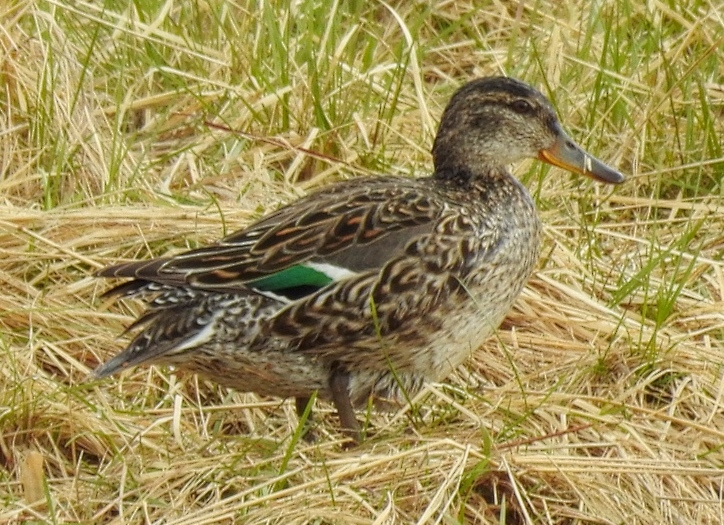 Scientific name: Anas crecca Original file: DSCN2282-new